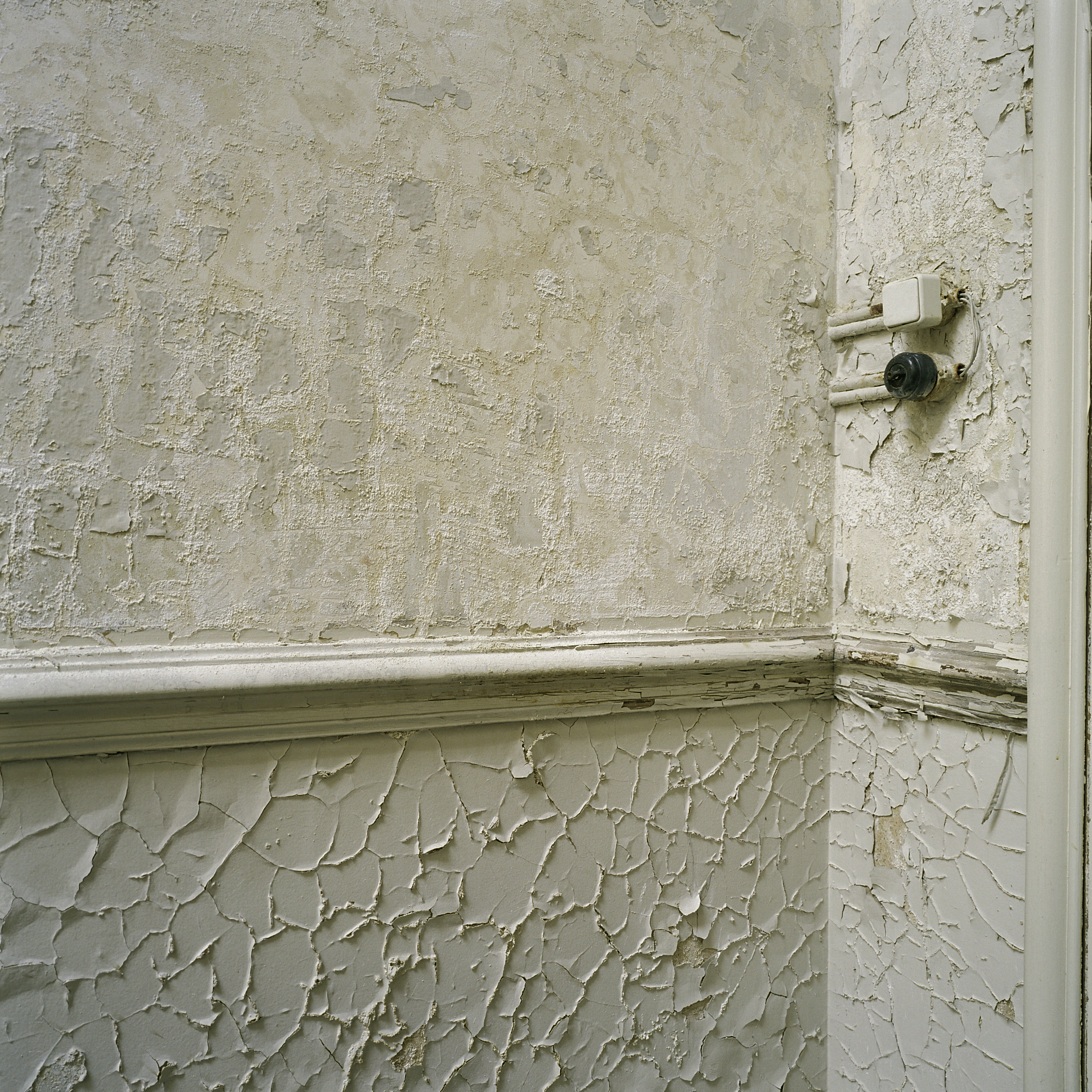 Timmerfabriek: Interieur, detail van een muur met afgebladerde verf